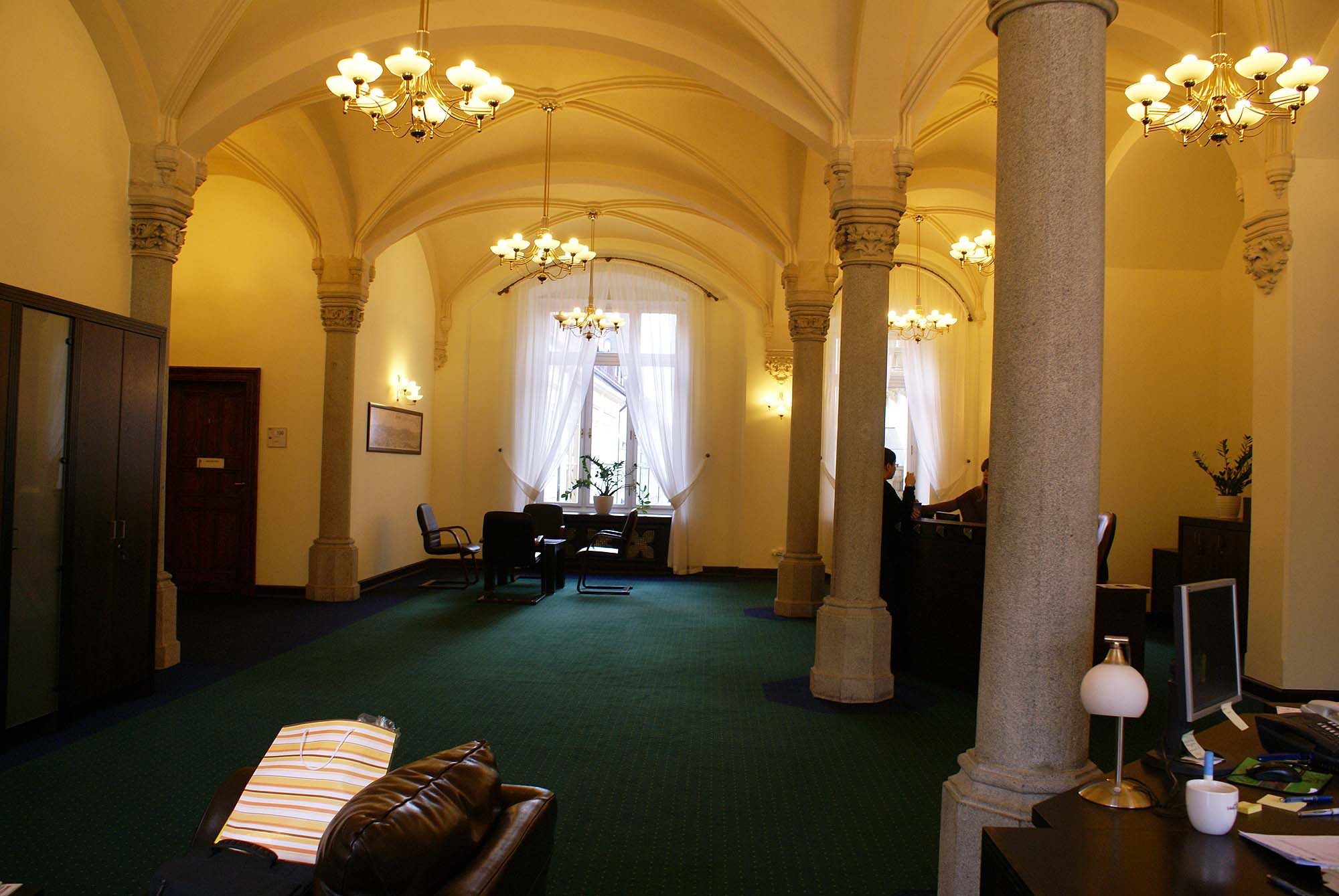 Wrocław, nowy ratusz, XV, 1859